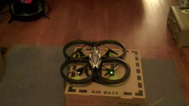 Fotografía de celular de un Parrot AR.Drone con su embalaje y los Leds indicadores en verde, listo para volar.